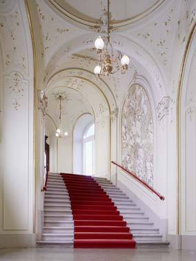 Aufgang zur Parkettgalerie